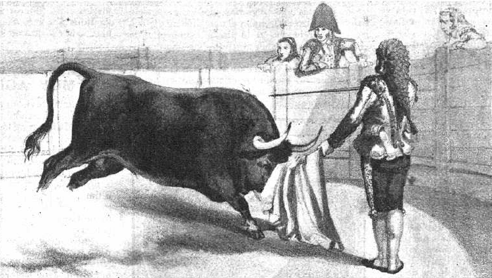 Estampa de su época que representa al torero español Pedro Romero en la suerte de recibir